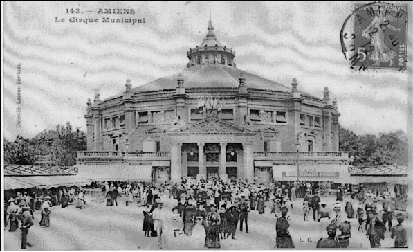 Le cirque d'Amiens au début en 1912, à l'occasion de la fête de la St-Jean Source : archives départementales de la Somme, cote 8 FI 877 (libre de droits) à vérifier quand même par rapport aux dates Tipiac 1 sep 2004 à 00:57 (CEST) Elle est de 1912 (atesté de mes propres yeux !), donc y a pas de problème. Mathounette 1 sep 2004 à 09:55 (CEST)